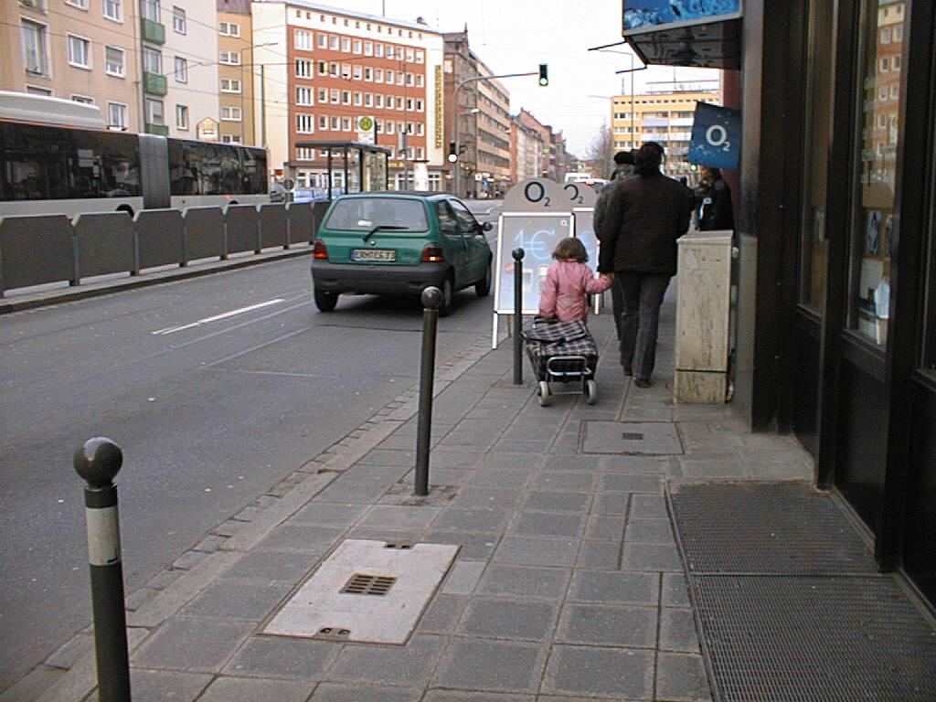 Einbauten und Werbetafeln auf einem Gehweg in Nuernberg